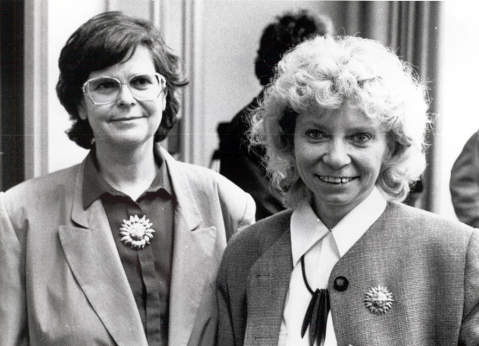 Ruth Dreifuss und Christiane Brunner (von links), Schweizer Politikerinnen (SP)